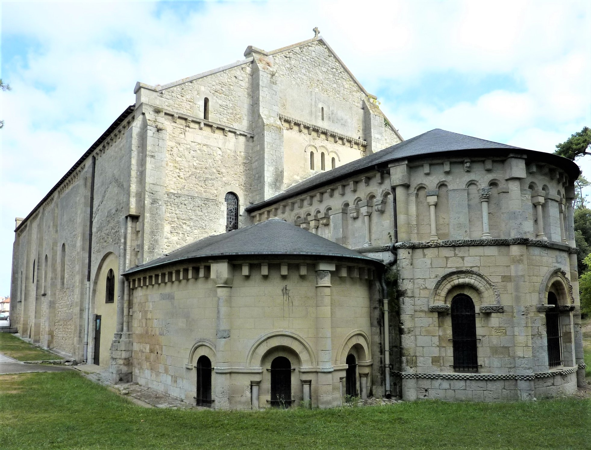 Église Notre-Dame de la Fin-des-Terres